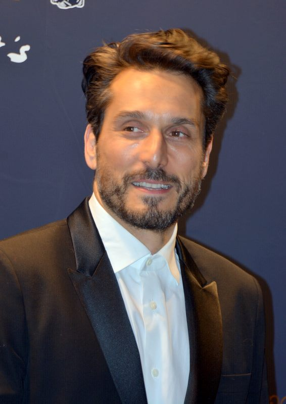 Vincent Elbaz à la cérémonie des César